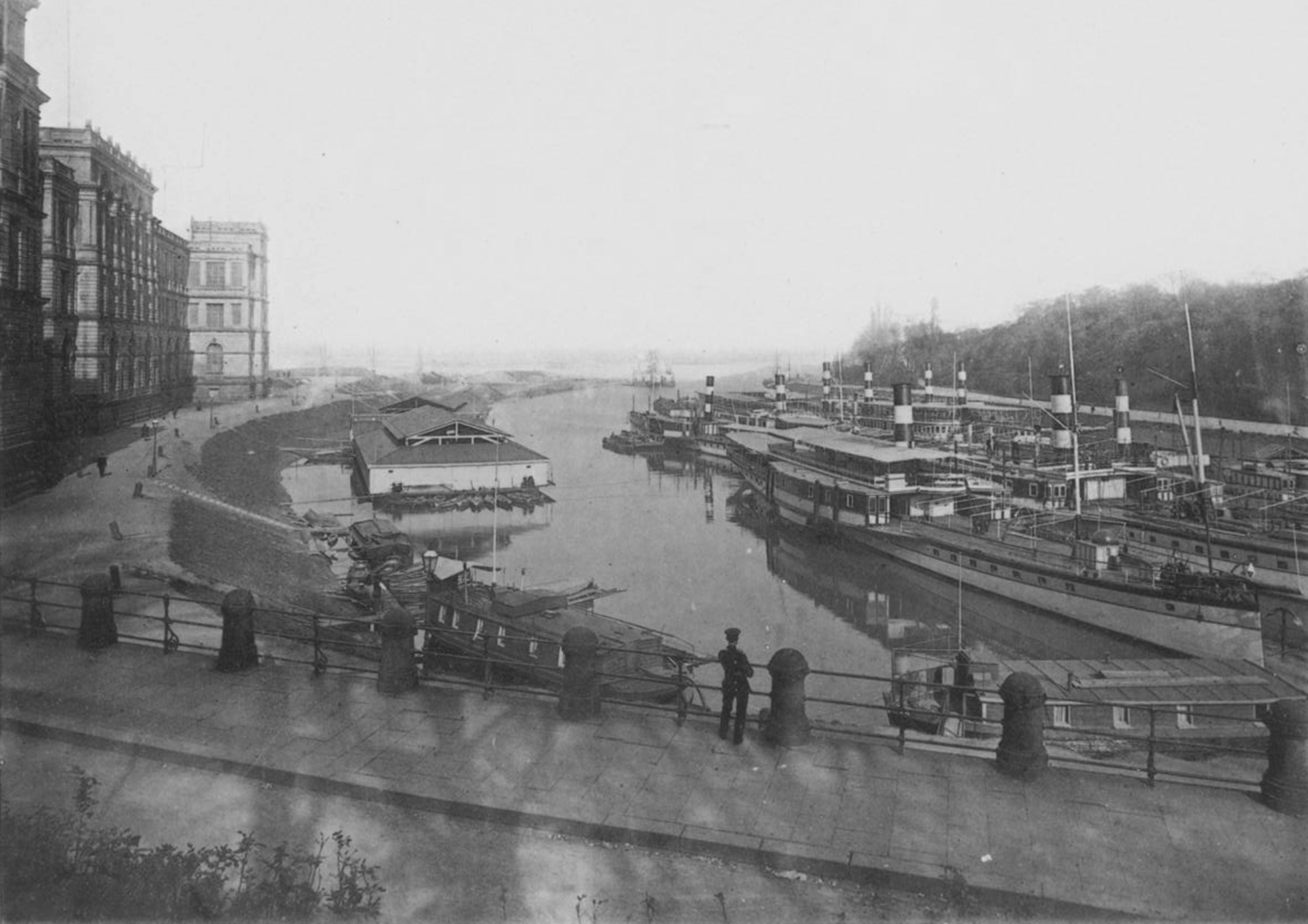 Sicherheitshafen vor Beginn der Zufüllarbeiten. Frühjahr 1897 (Tafel 16)